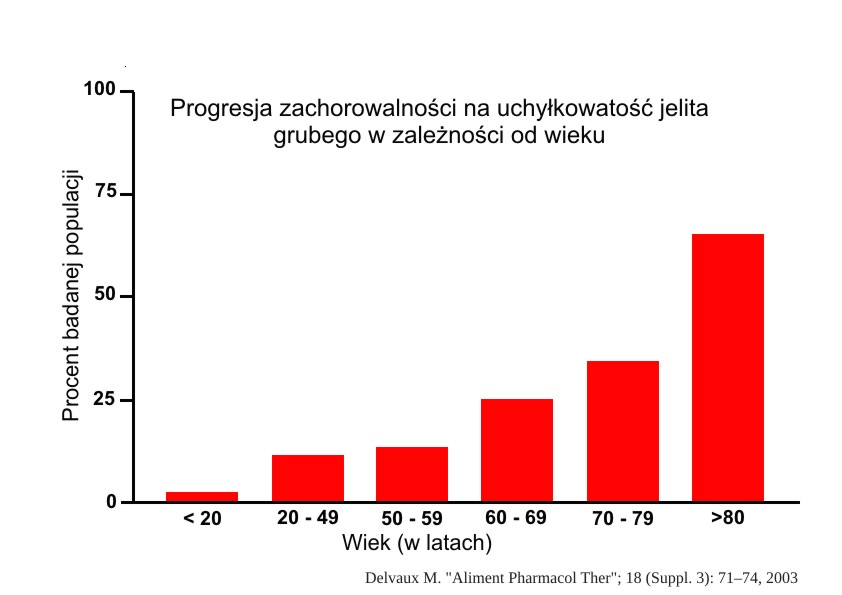 Występowanie uchyłkowatości jelita grubego w zależności od wieku